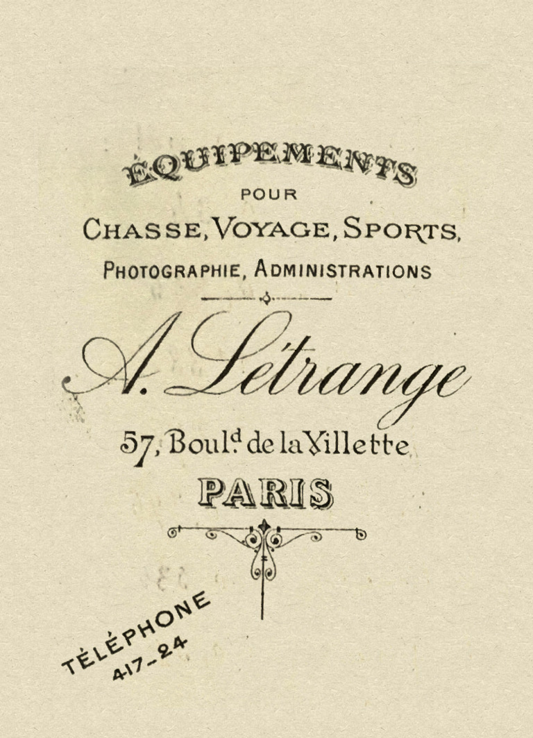 Etiquette A. Létrange, 57 Bd de la Villette, Paris, non datée